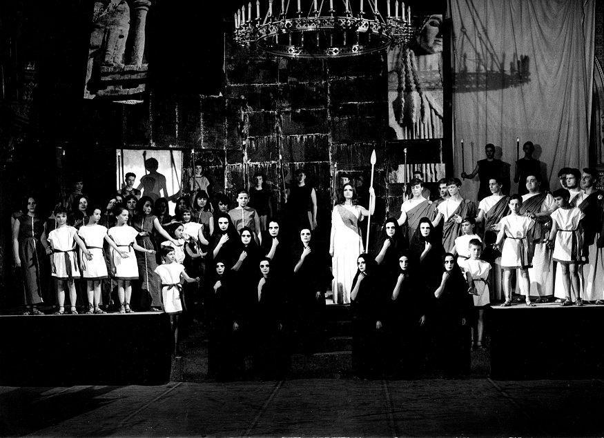 Aischylos: Orestie; Griechisches Schultheater am Akademischen Gymnasium Wien, 1965